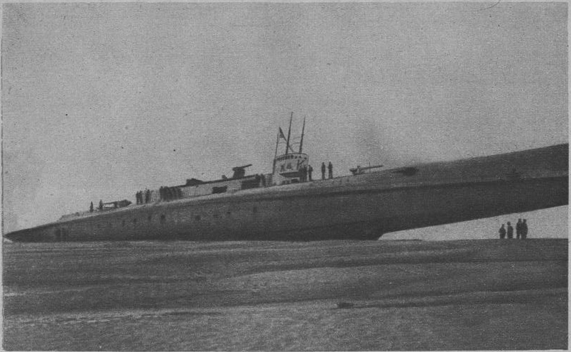 vue d'un sous_marin_britanique de la_classe_K_échoué sur un banc de sable anglais, il fut remis à flot sans dommages à la marée suivante.